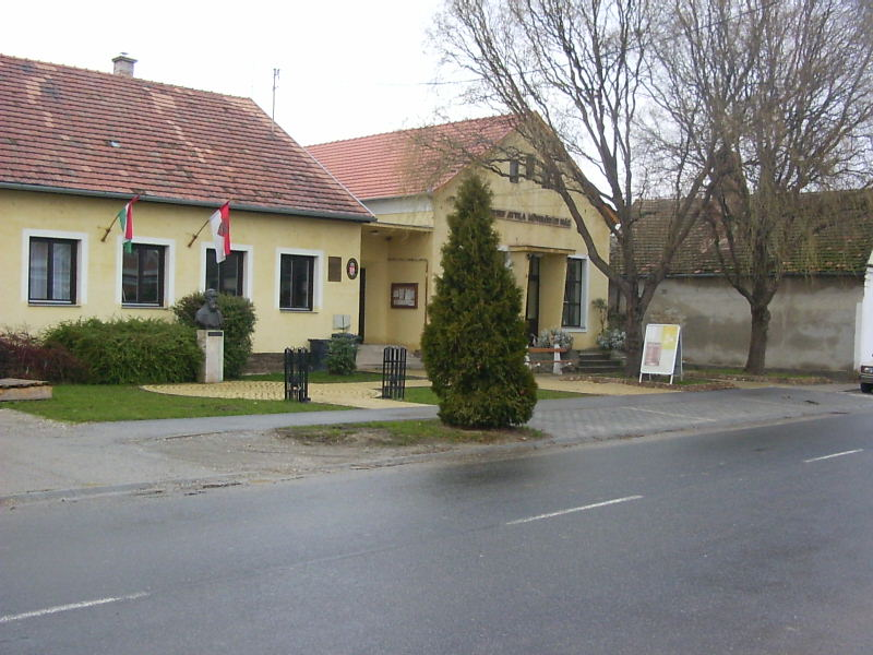 Intézményközpont a (falu) városrész centrumában (Balf, Sopron)